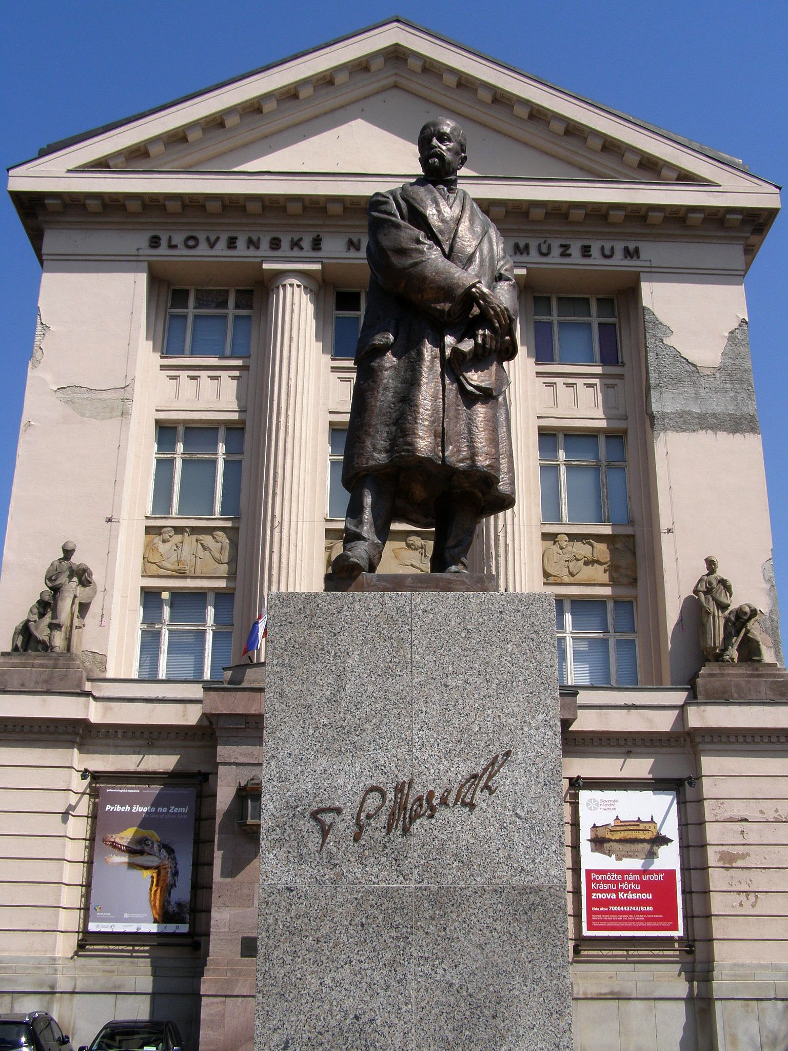 Detail pamätníka so sochou T. G. Masaryka. Autorom sochy je Jaroslav Matějíček